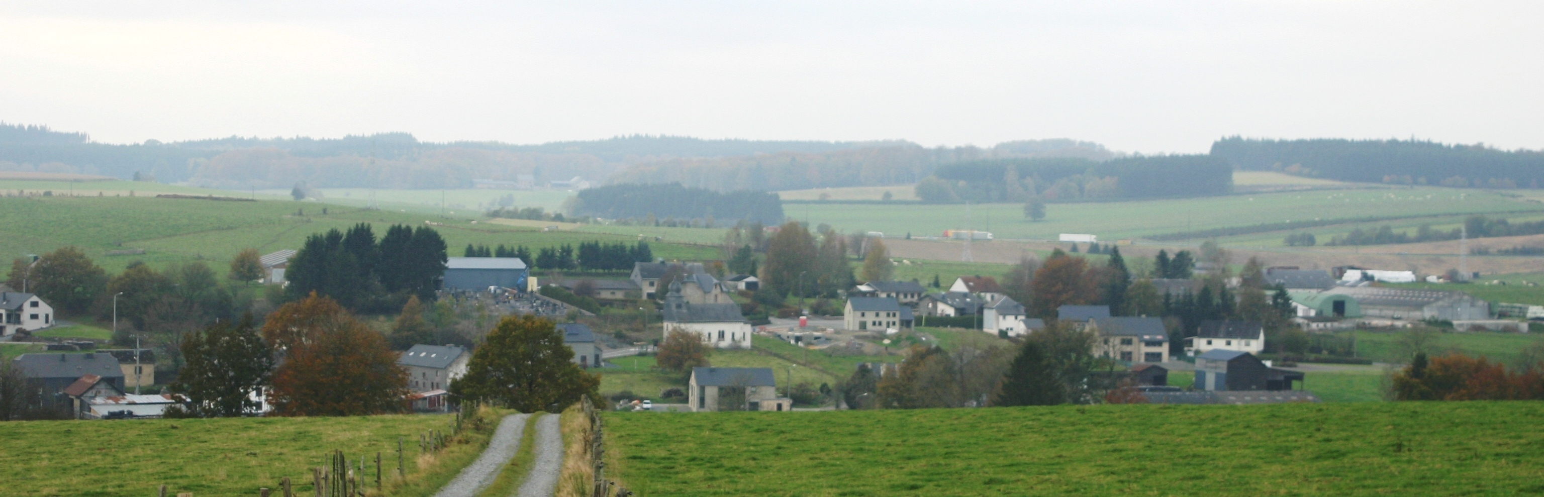 Remichampagne am Hierscht 2007 vu Süde gesinn.